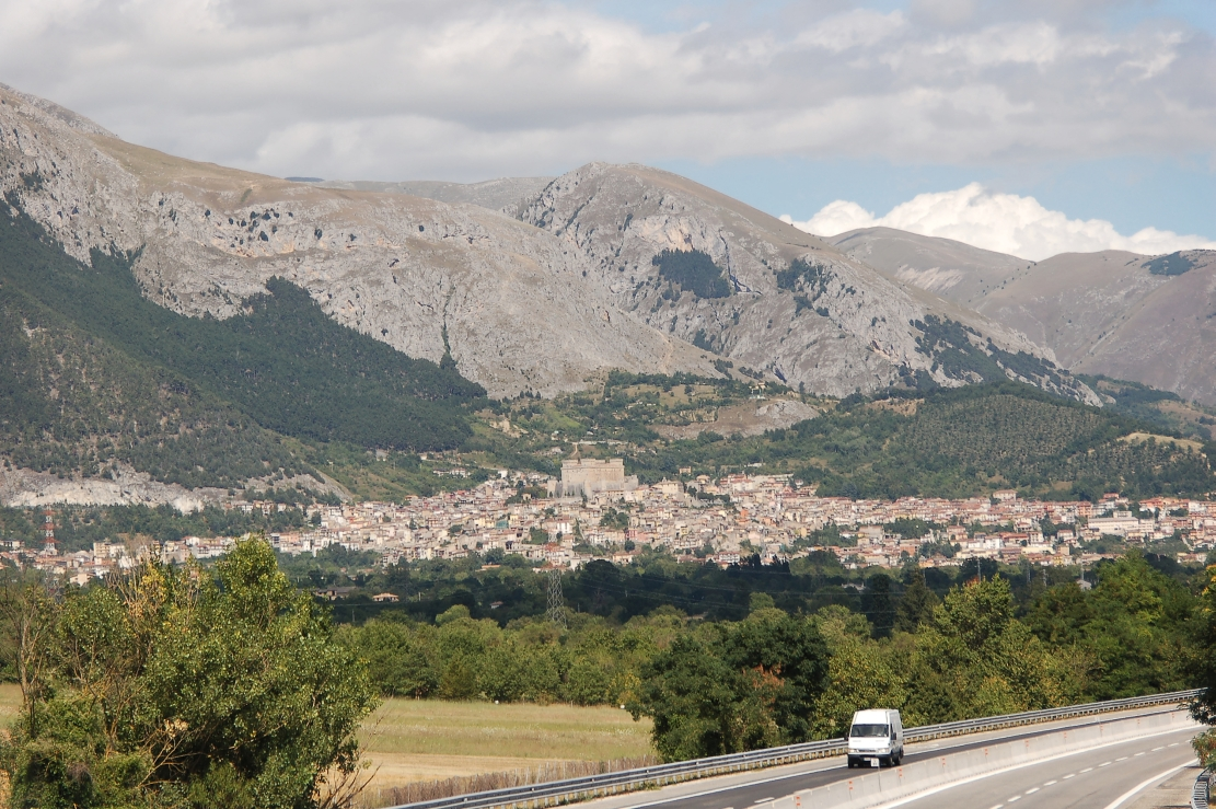 Autostrada A25 Italia